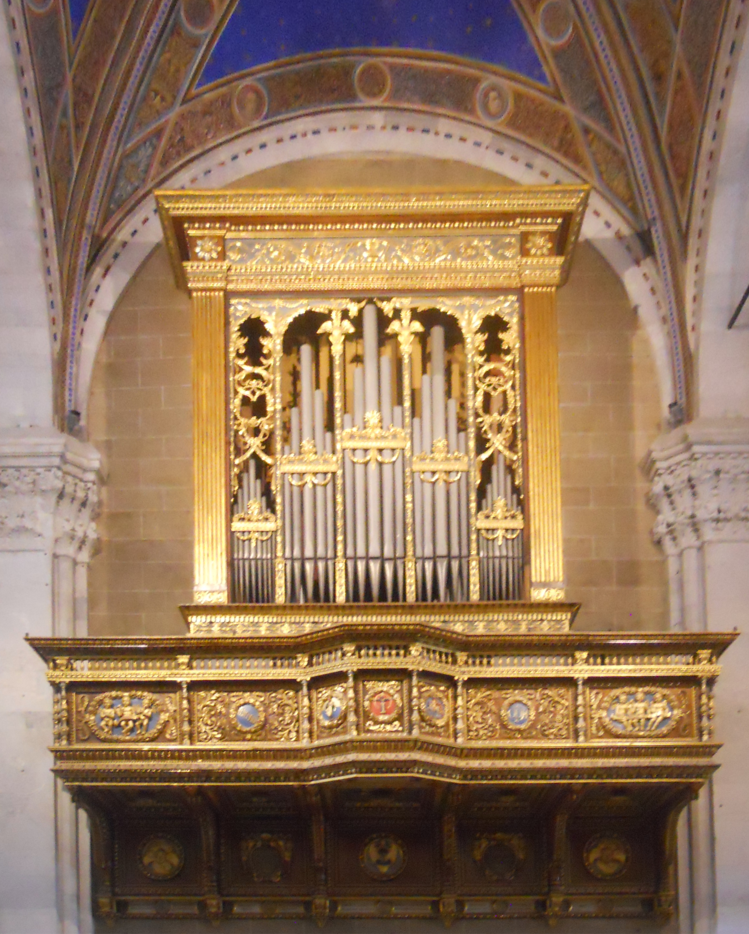 La cassa di destra dell'organo Mascioni opus 775 (III+P/48) della cattedrale di San Martino a Lucca.